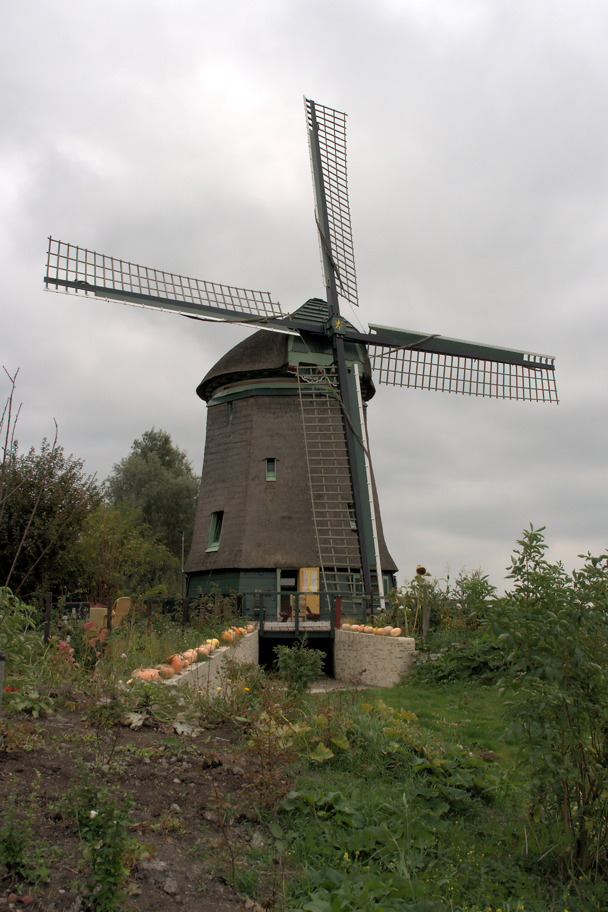 Aartswoud - Westuit Nr. 7 / Koggemolen